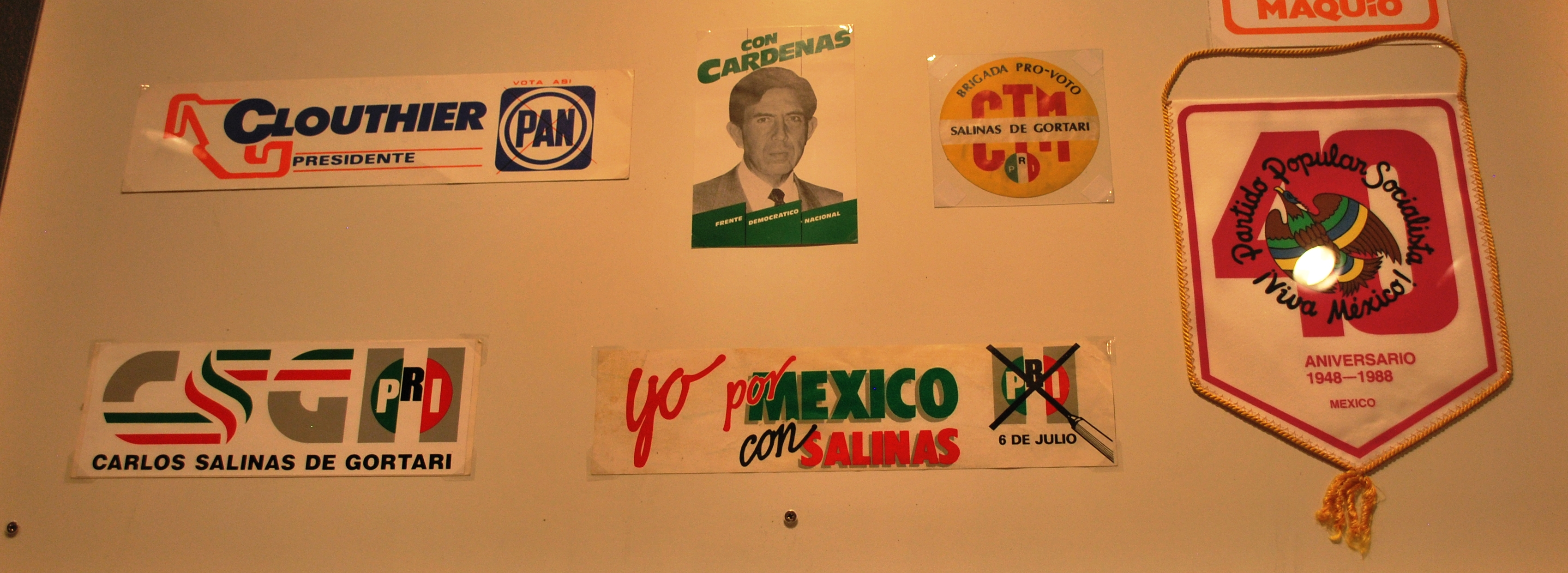 Political campaign itesm on display at the Museo del Objeto del Objeto